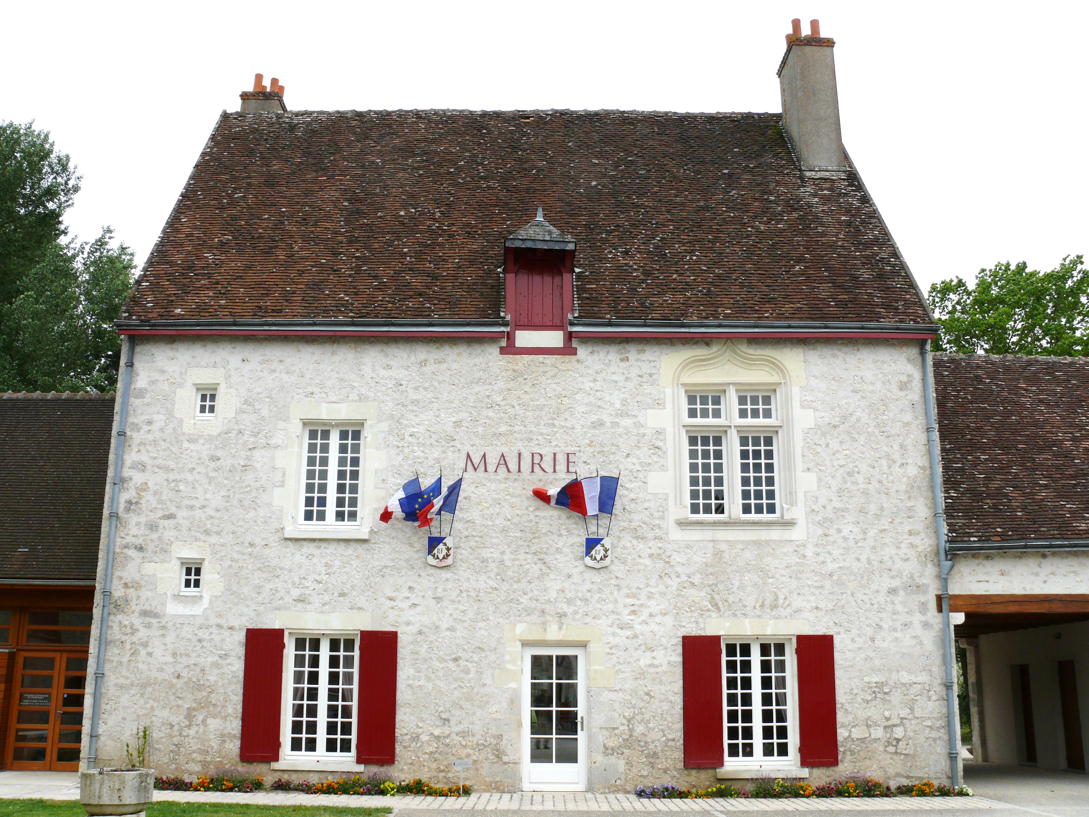 Fougères-sur-Bièvre - Mairie